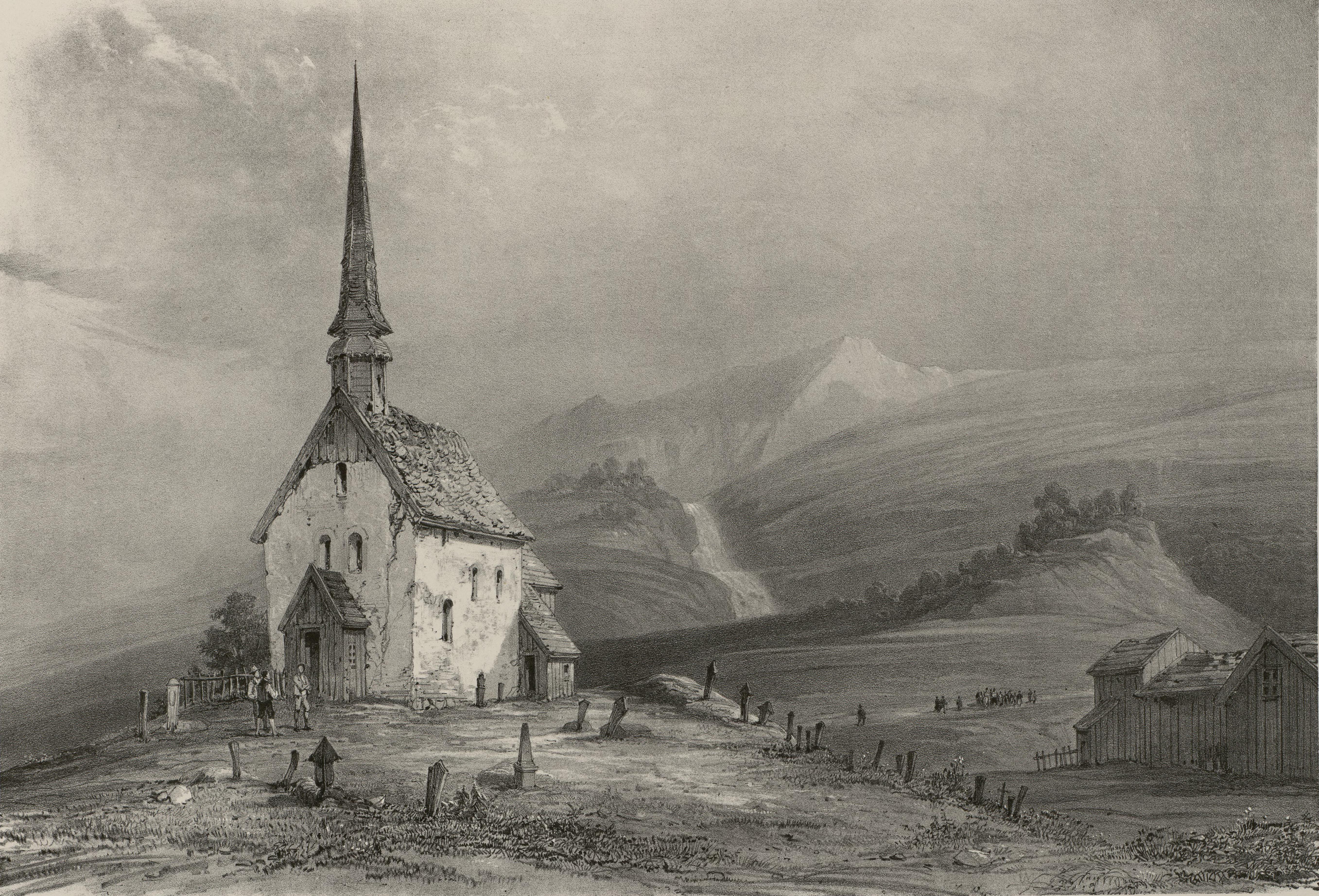 Illustrasjon hentet fra boken "Voyages de la Commission scientifique du Nord, en Scandinavie, en Laponie, au Spitzberg et aux Feröe" av ukjent forfatter og utgitt av Arthus BertrandParis : Arthus Bertrand, [1852] (Paris, [1852])